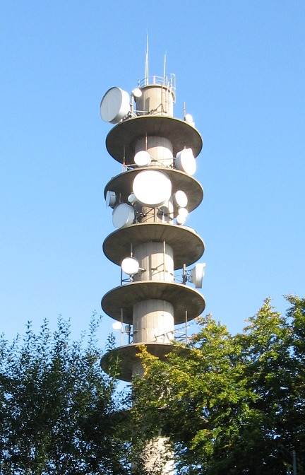 Fernmeldeturm der US-Streitkräfte Heidelberg